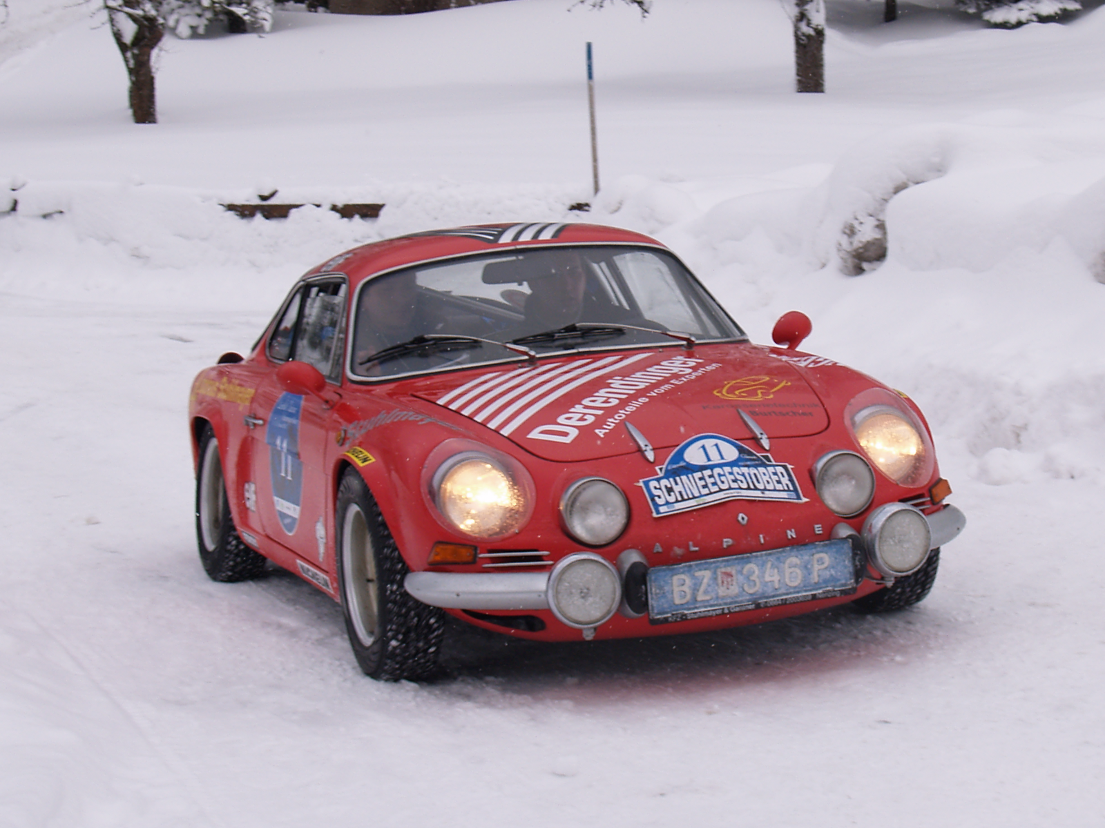 Renault Alpine bei mder Winterrallye Schneegestöber in Vorarlberg